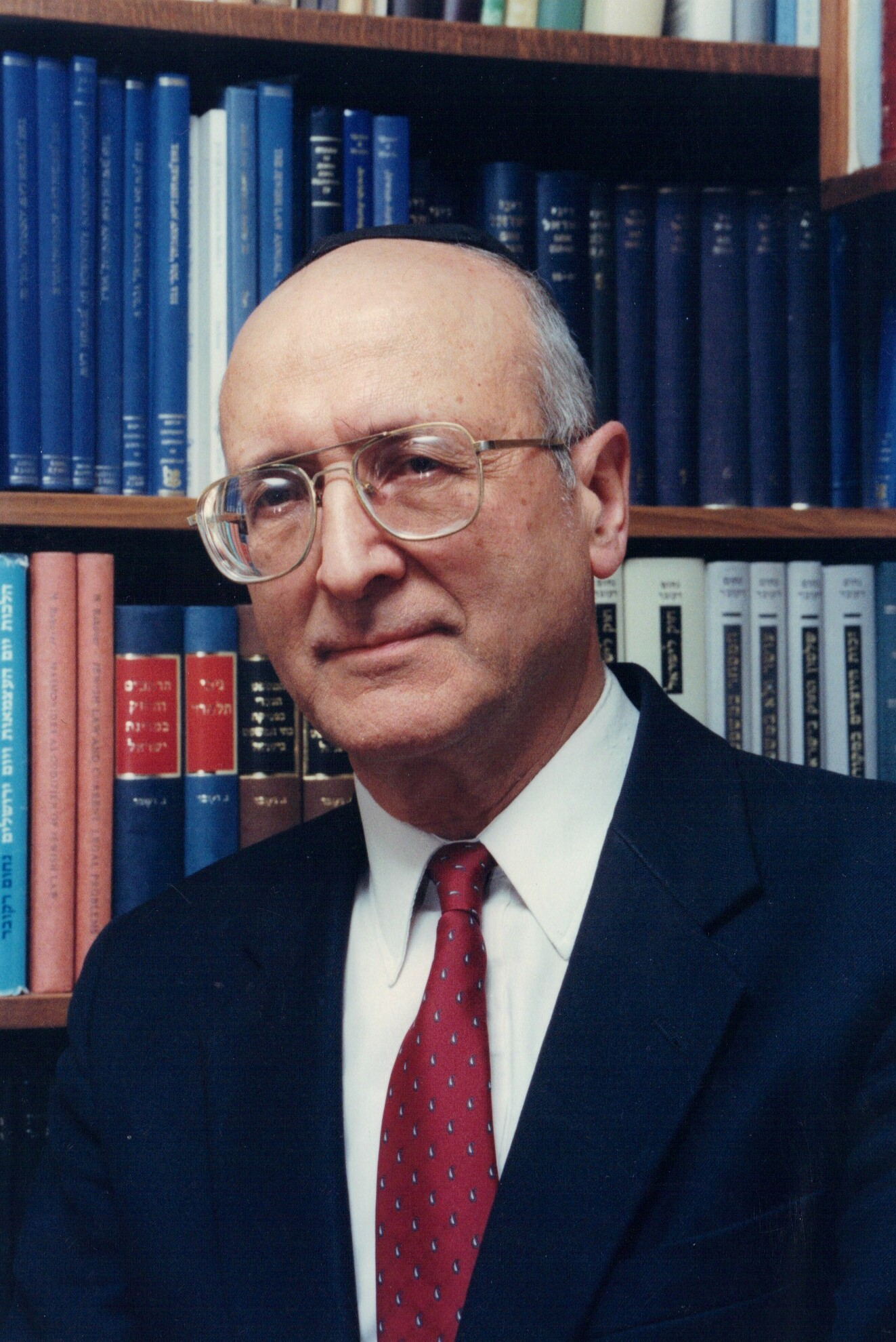 נחום רקובר הוא פרופסור למשפטים המתמחה בחקר המשפט העברי